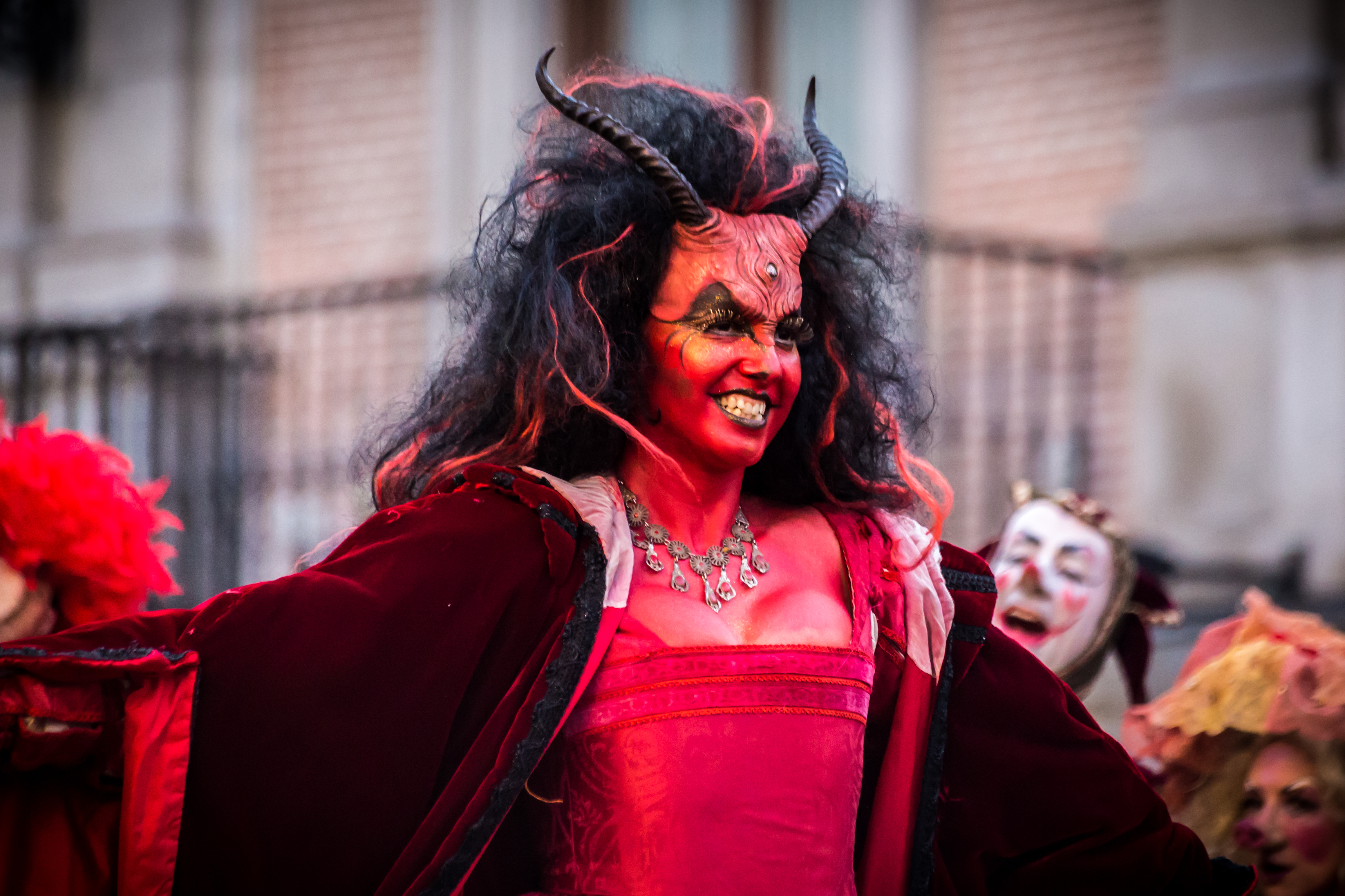 Acto del pregón del carnaval en la Plaza de la Villa, Madrid.